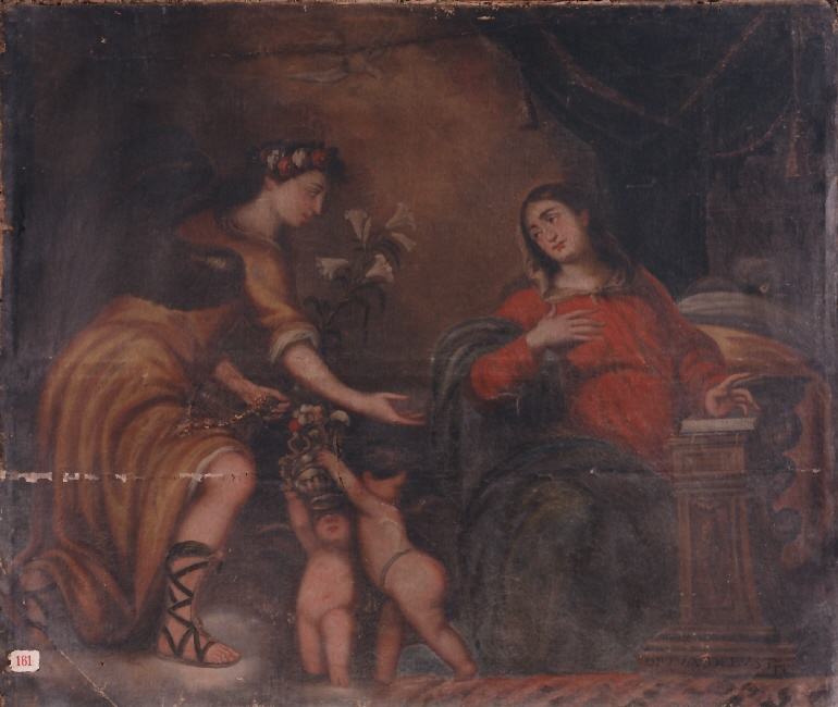 La obra representa el momento en que el arcángel San Gabriel anunció a la Virgen María que sería la madre del Mesías.